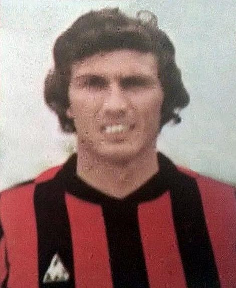 Roger Jouve en 1976 (OGC Nice), 'Football 76', Panini figurina n°203.